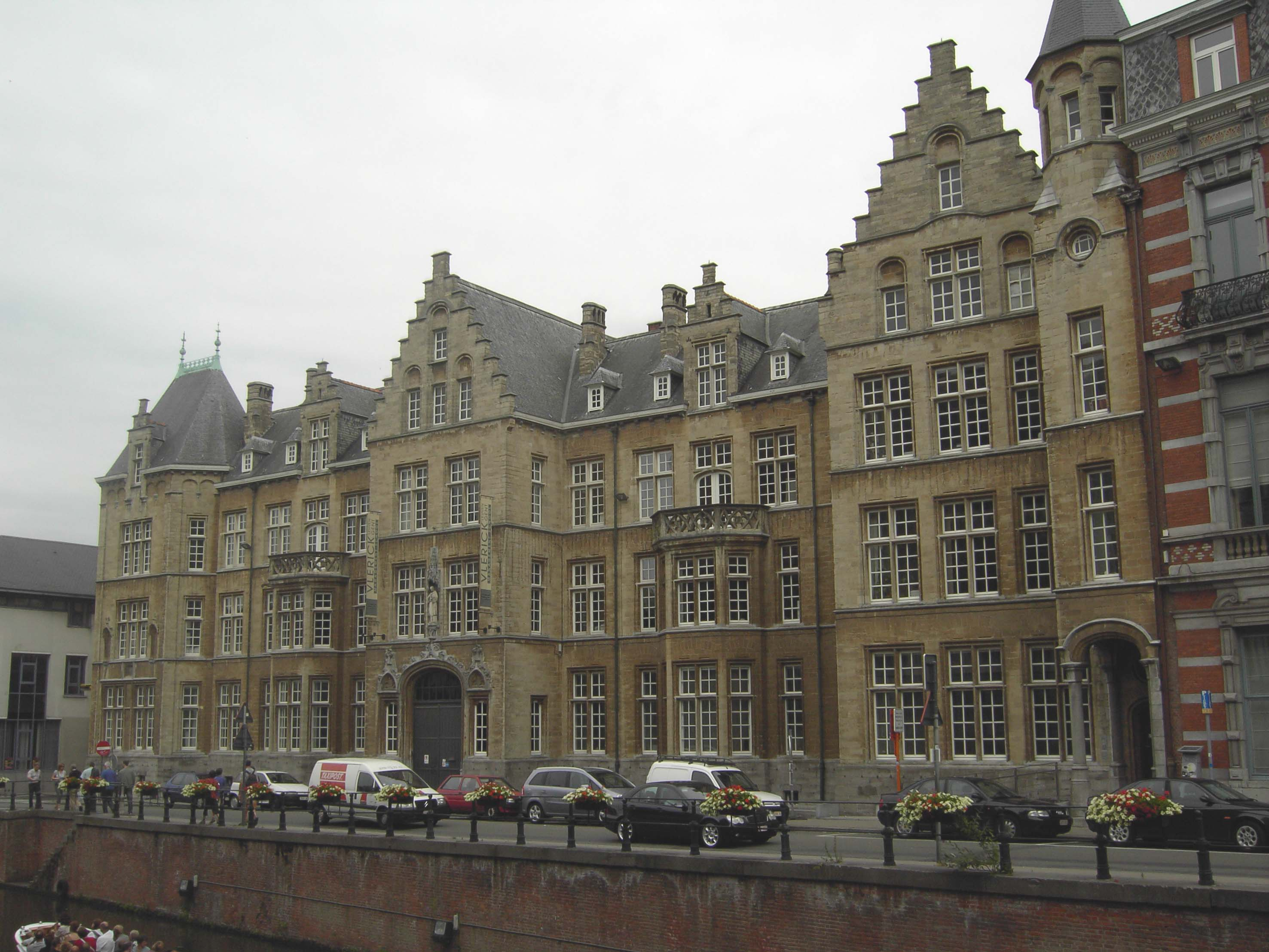 De Vlerickschool en het voormalige bisschoppelijk seminarie - Gent - België